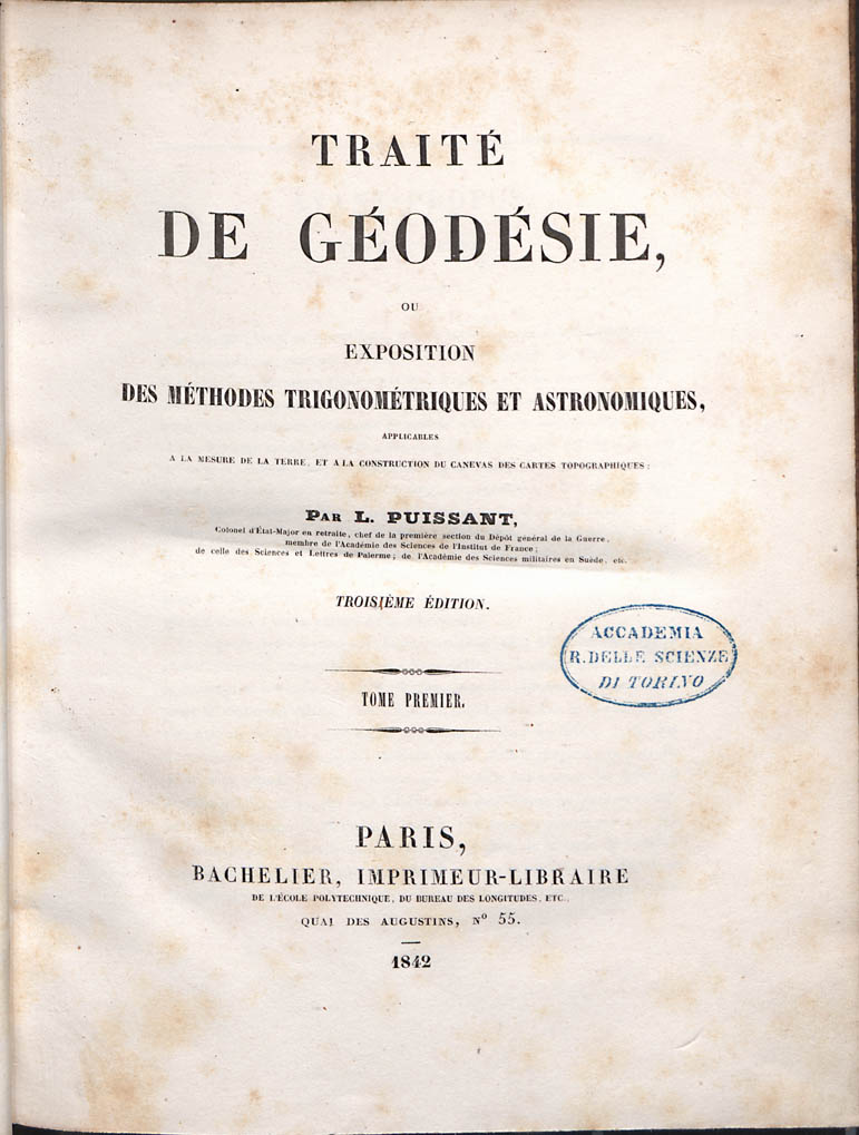 Frontespizio